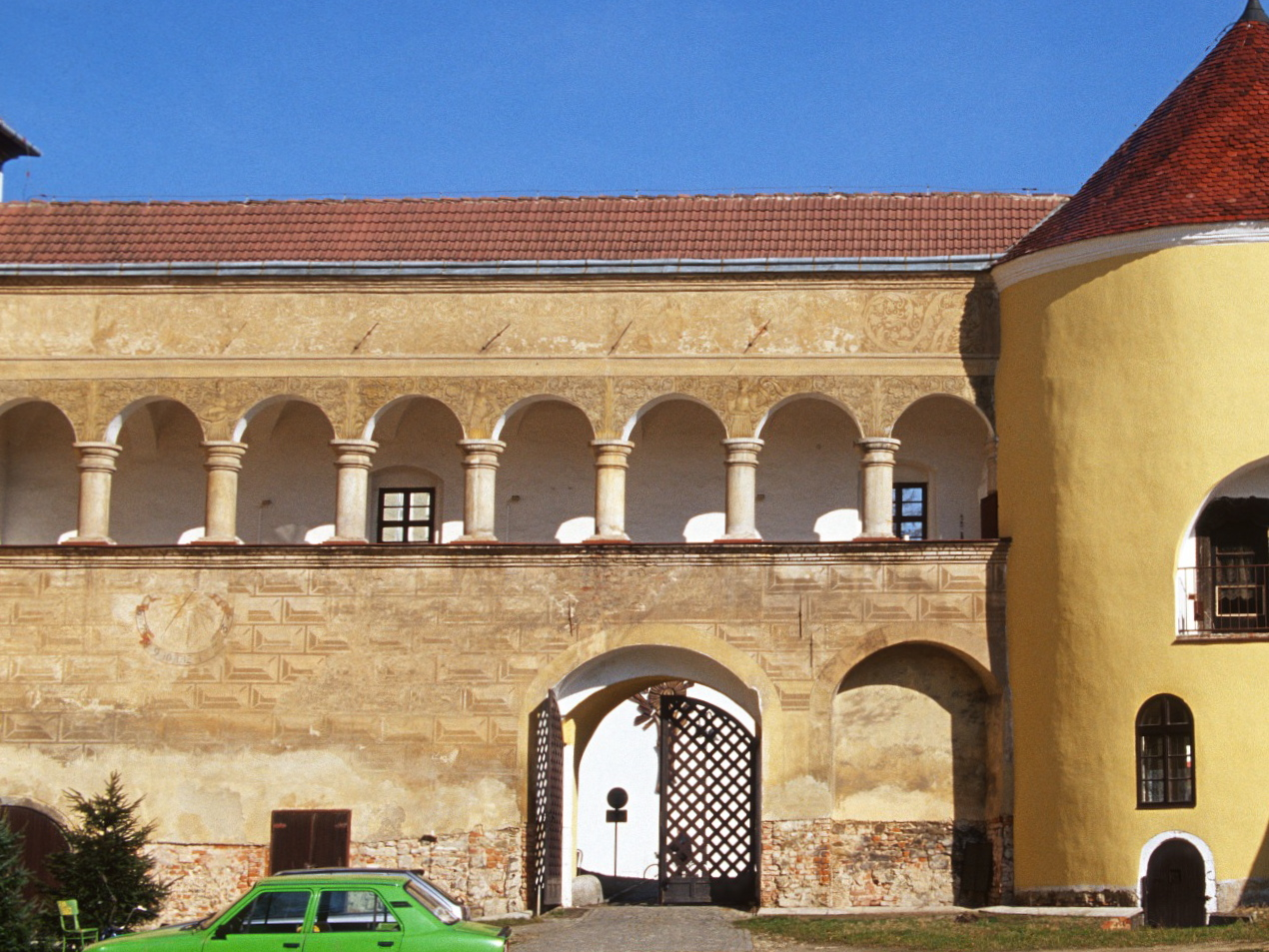 en: Courtyard of Krnov castle, before restoration de: Hof des Schlosses von Krnov, vor der Restaurierung